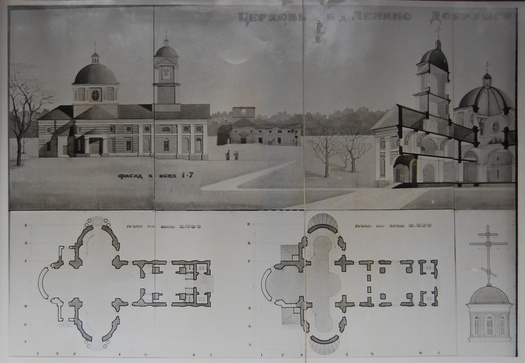 Праект рэстаўрацыі Свята-Мікалаеўскай царквы ў Леніна.